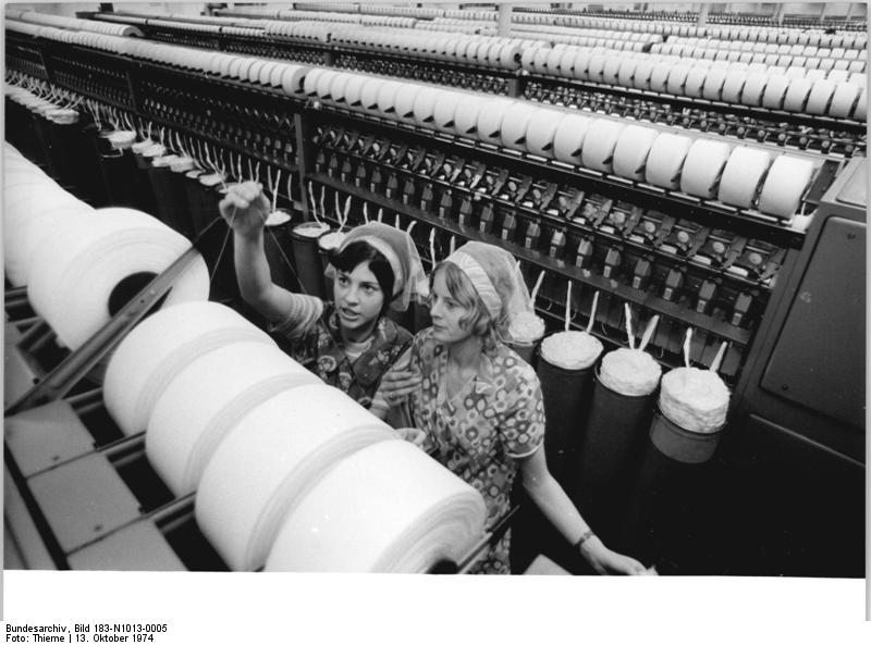 ADN-ZB-Thieme-13.10.74-la-Bez .Karl-Marx-Stadt: Experimentalspinnerei bringt Vorteile für DDR- und UdSSR Partner -Das [Rationalisierungsobjekt Experimentalspinnerei für die Verarbeitung synthetischer Fasern im Betriebsteil Meerane der Baumwollspinnerei- und Zwirnerei Flöha wurde drei Monate vorfristig in Betrieb genommen. Die hier gesammelten Erfahrungen werden ein gemeinsames Forschungsprogramm des DDR-Betriebes und der Moskauer Baumwollfabrik "M.W.Frunse" unterstützen. An den modernen BD-Spinnmaschinen aus der CSSR in der Experimentalspinnerei arbeiten Carmen Wlodek (l) und Martina Pfeil.